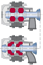 Verformungsrohr